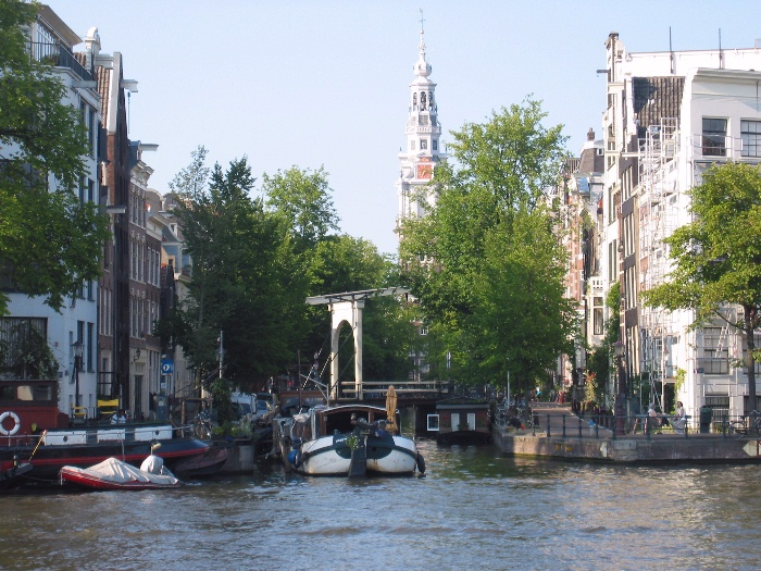 Zuiderkerk Amsterdam zoals Monet hem schilderde. Eigen foto (2004-07-28). Genomen voor Amstel 84, richting Groenburgwal.